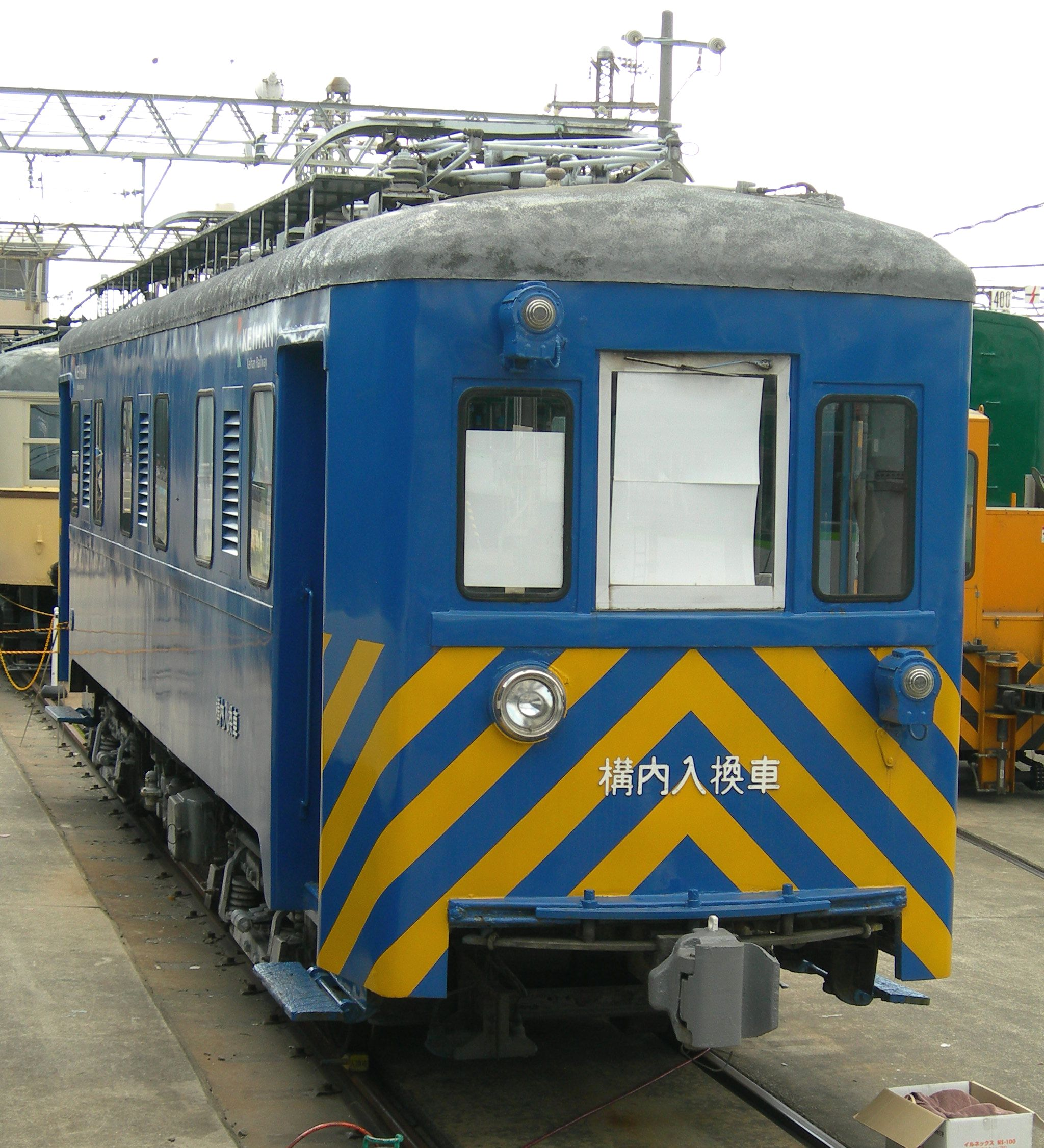 京阪70形電車